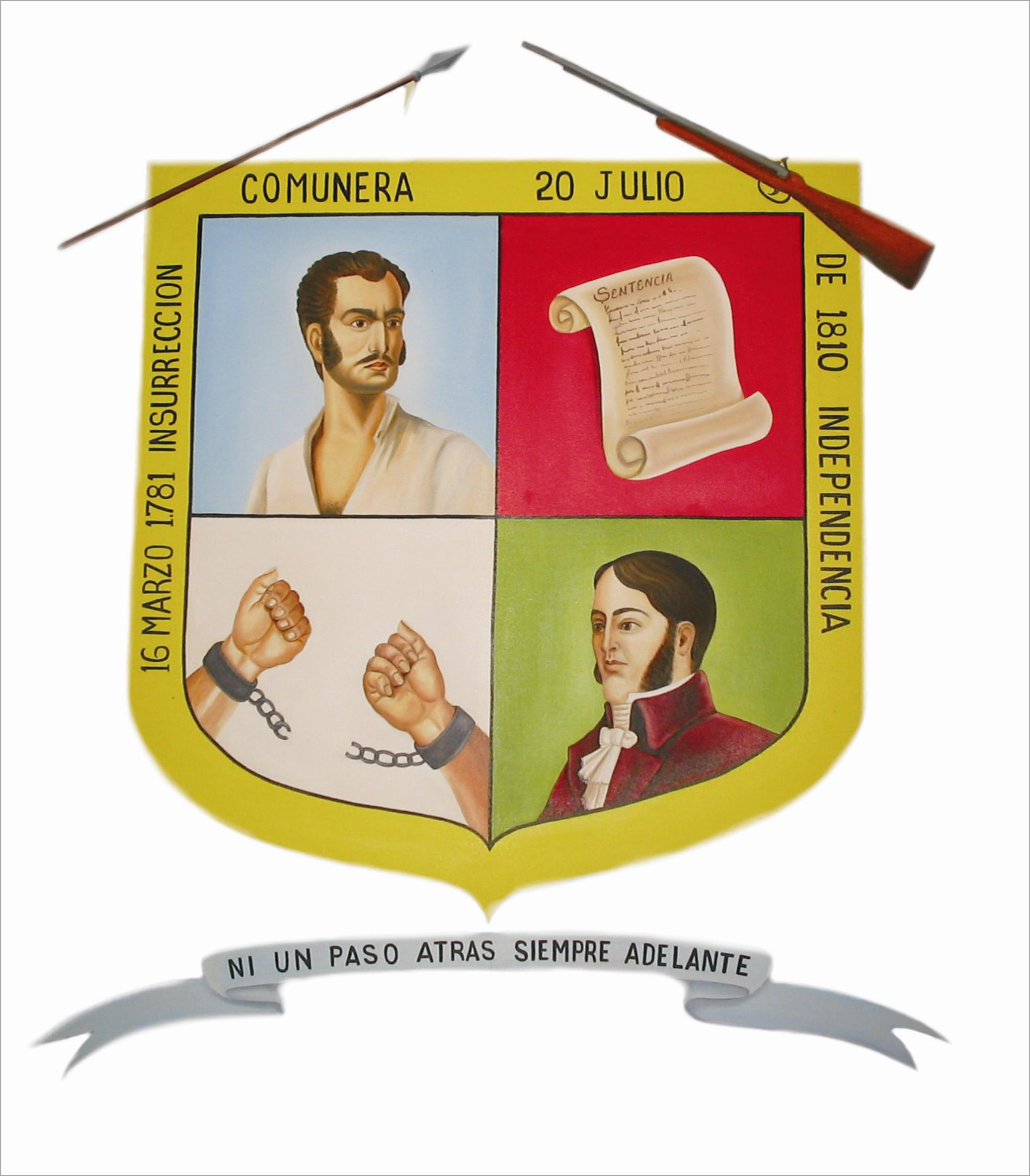 Escudo de la ciudad de Charalá (Colombia), en la que se resalta la figura del prócer José Antonio Galán y la insurrección de los Comuneros, llevada a cabo en 1781 contra la autoridad española.